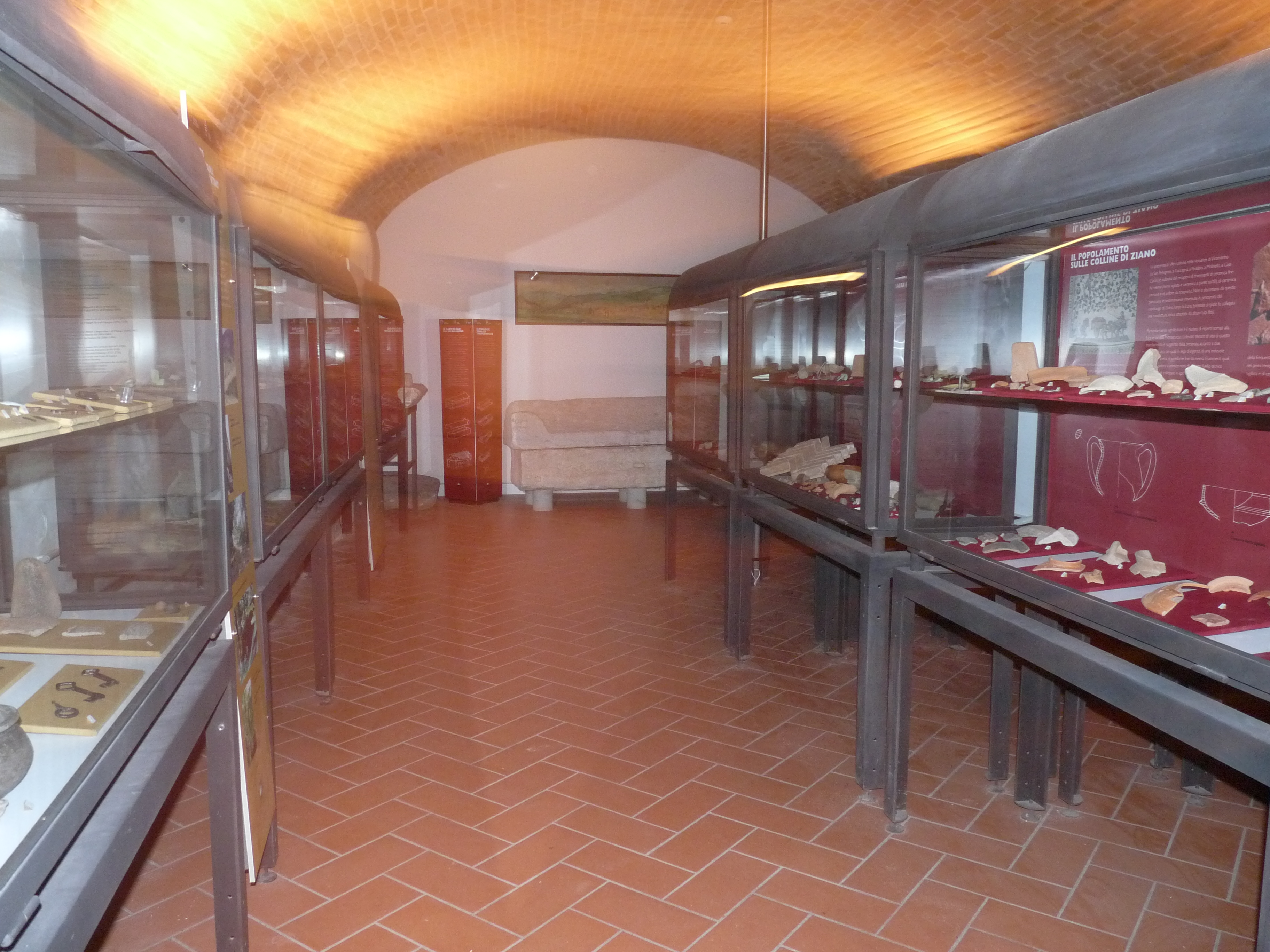 Sala 3 del Museo archeologico della Val Tidone